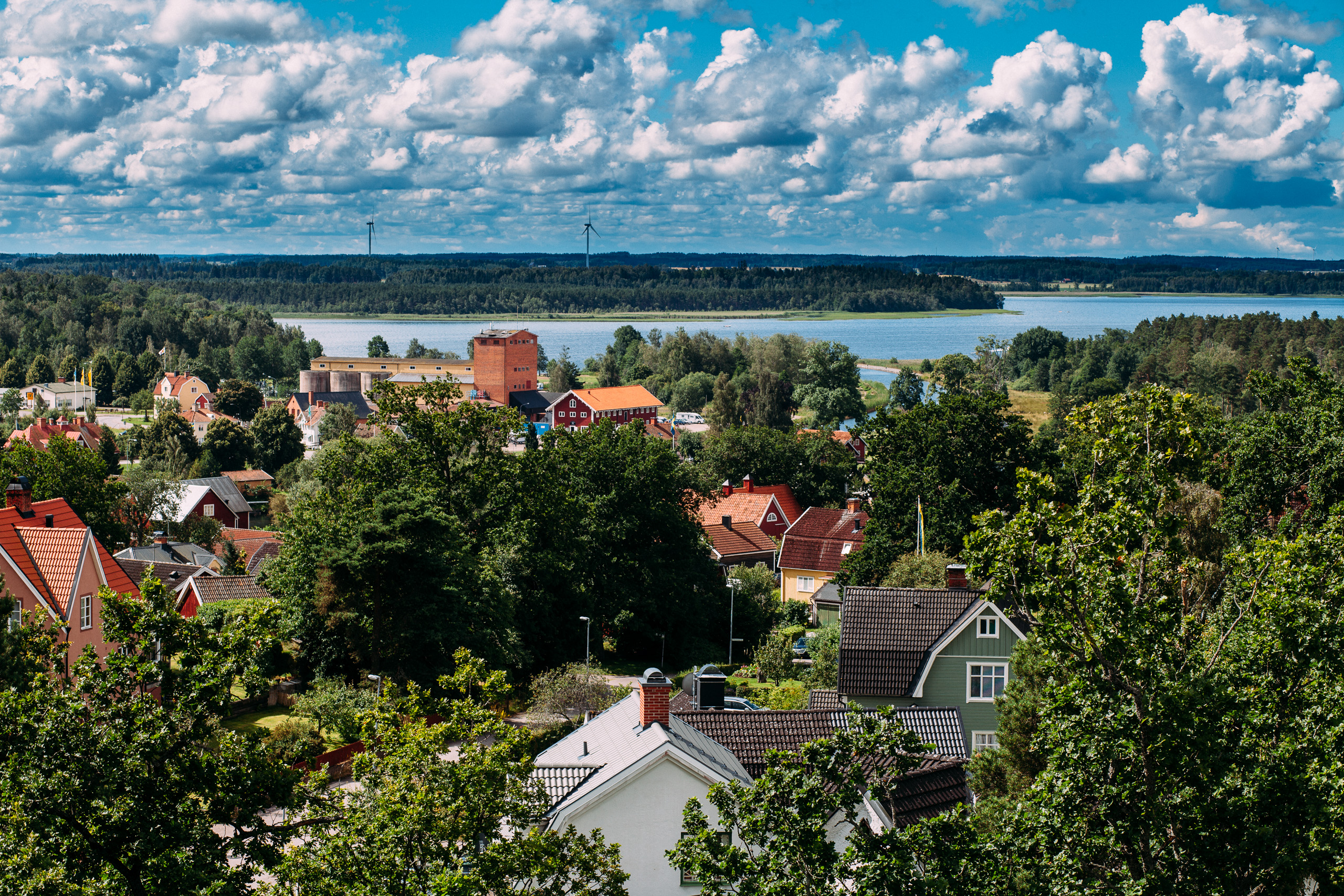 Vy över Borensberg sett från Klinten, 20 juli 2012